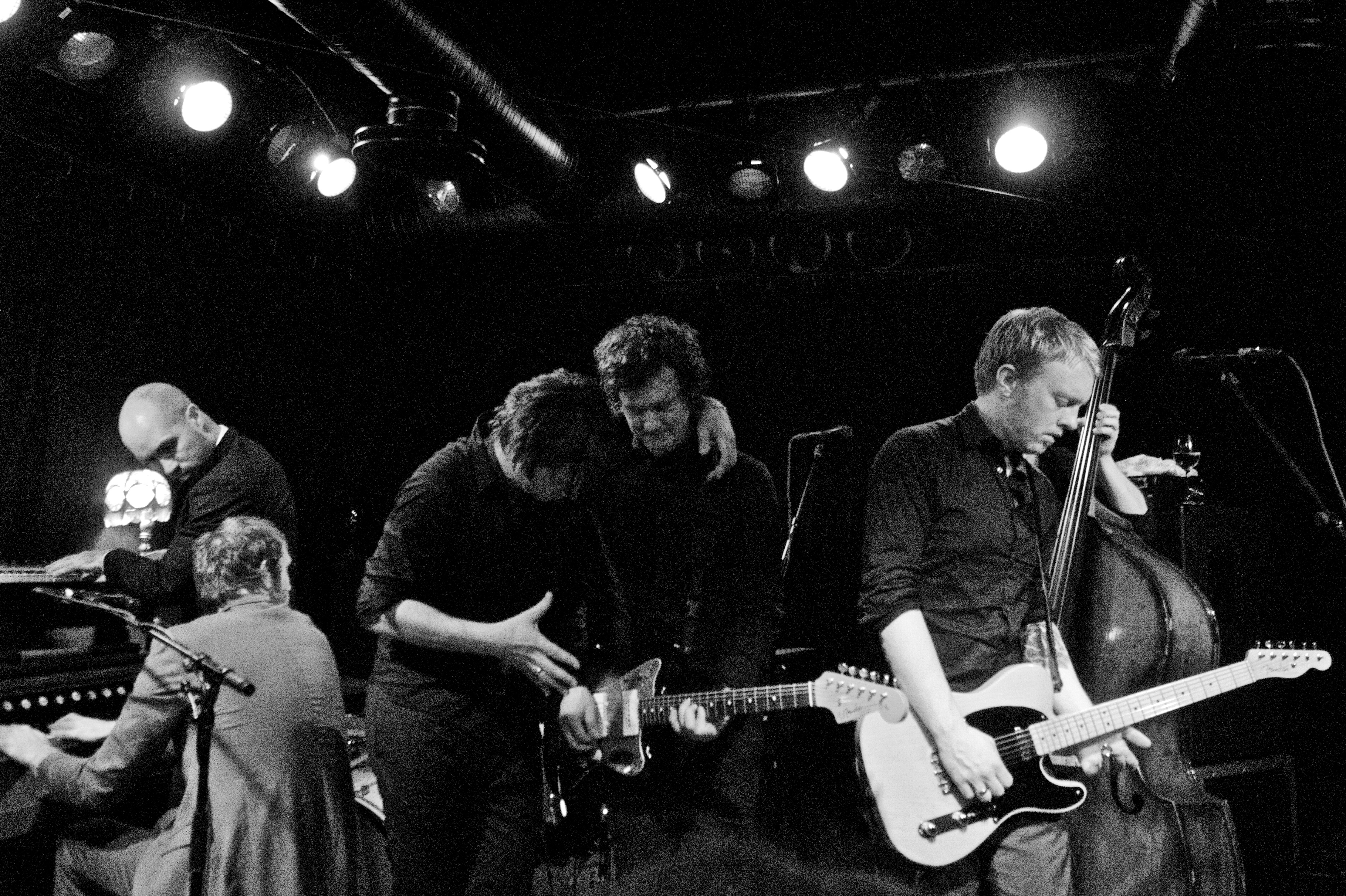 Kaizers Orchestra